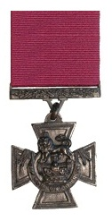 Victoria Cross (UK)